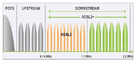 ADSL2 frequencies